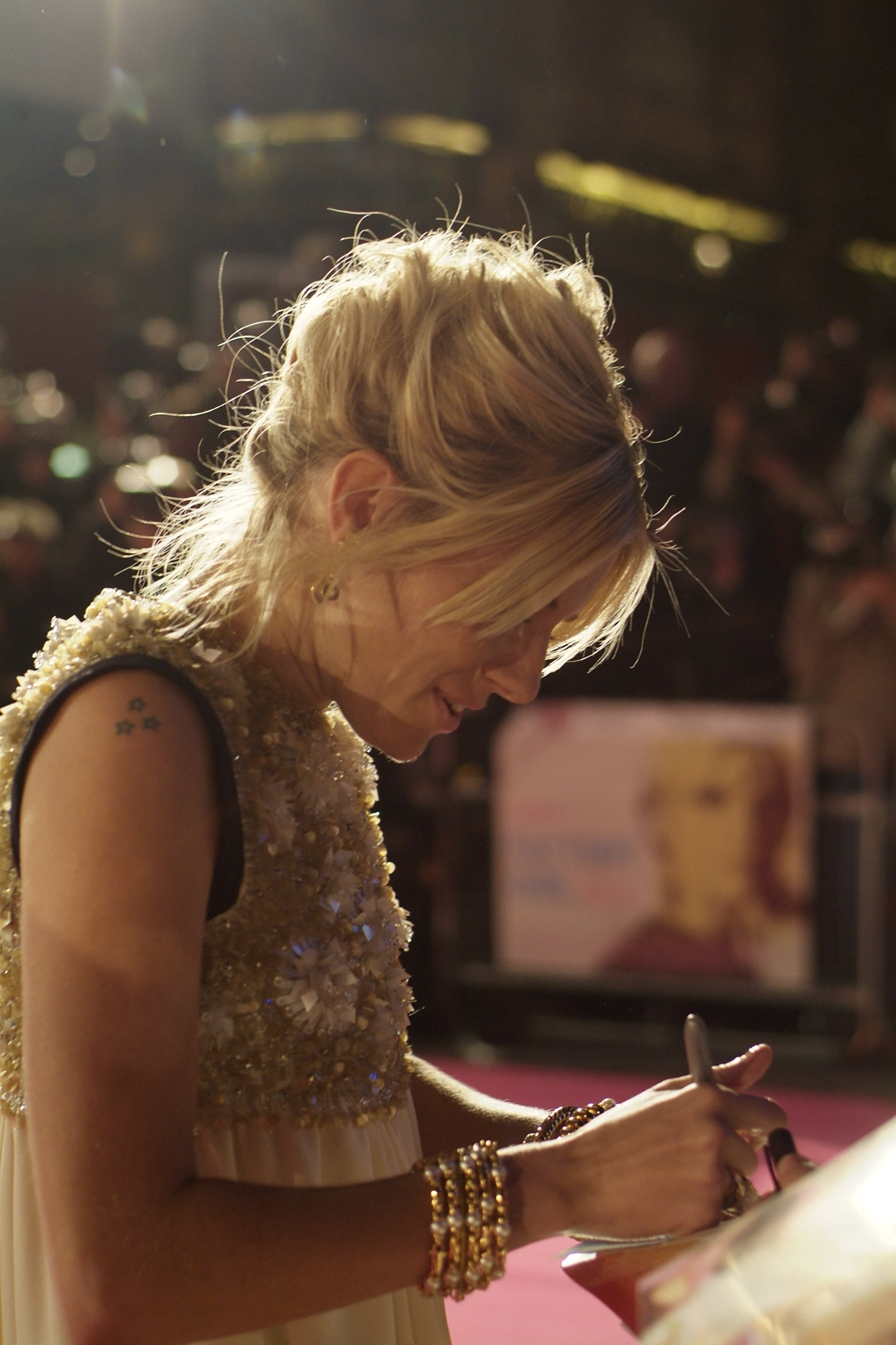 Sienna Miller